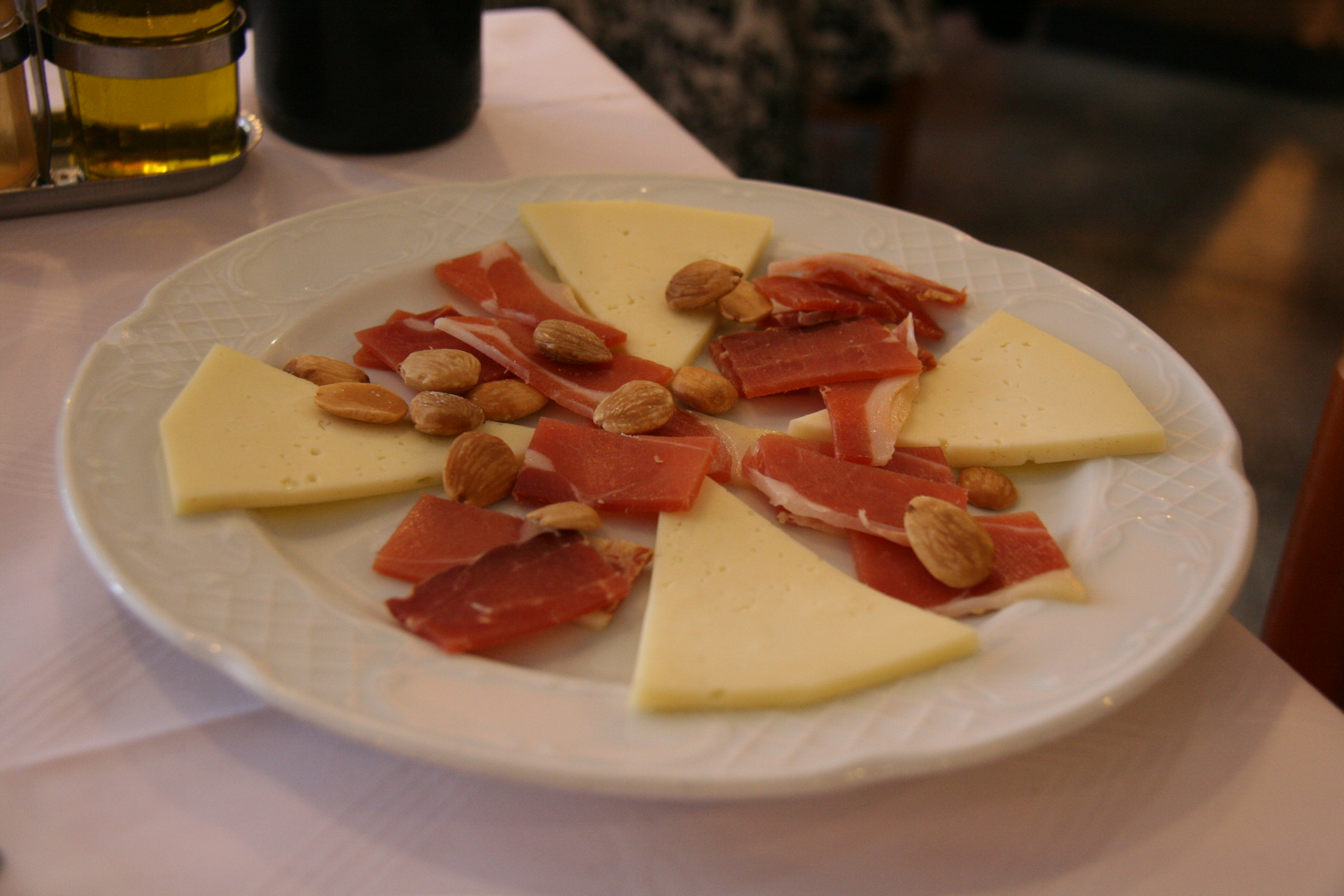 jamón, almendras, queso